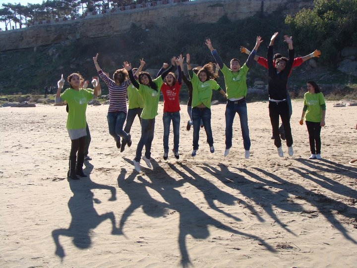 Зеленые на уборки территории в Бильгях